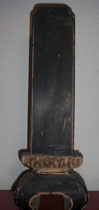 大澤寺所蔵 真宗大谷派 三河一向一揆以来､真宗(一向宗)と家康の軋轢から意向を汲んで真宗以外の葬儀がなされたため法名ではなく戒名となっている